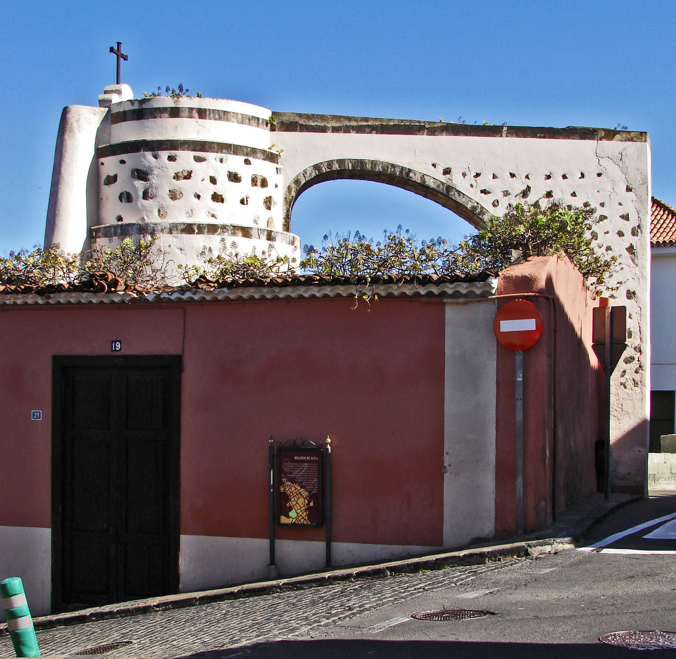 El Acueducto de Los Molinos